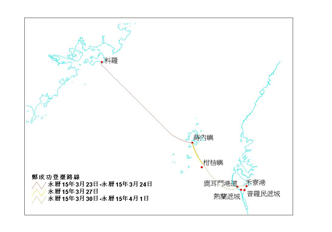 鄭軍從金門出發，橫渡台灣海峽的路線